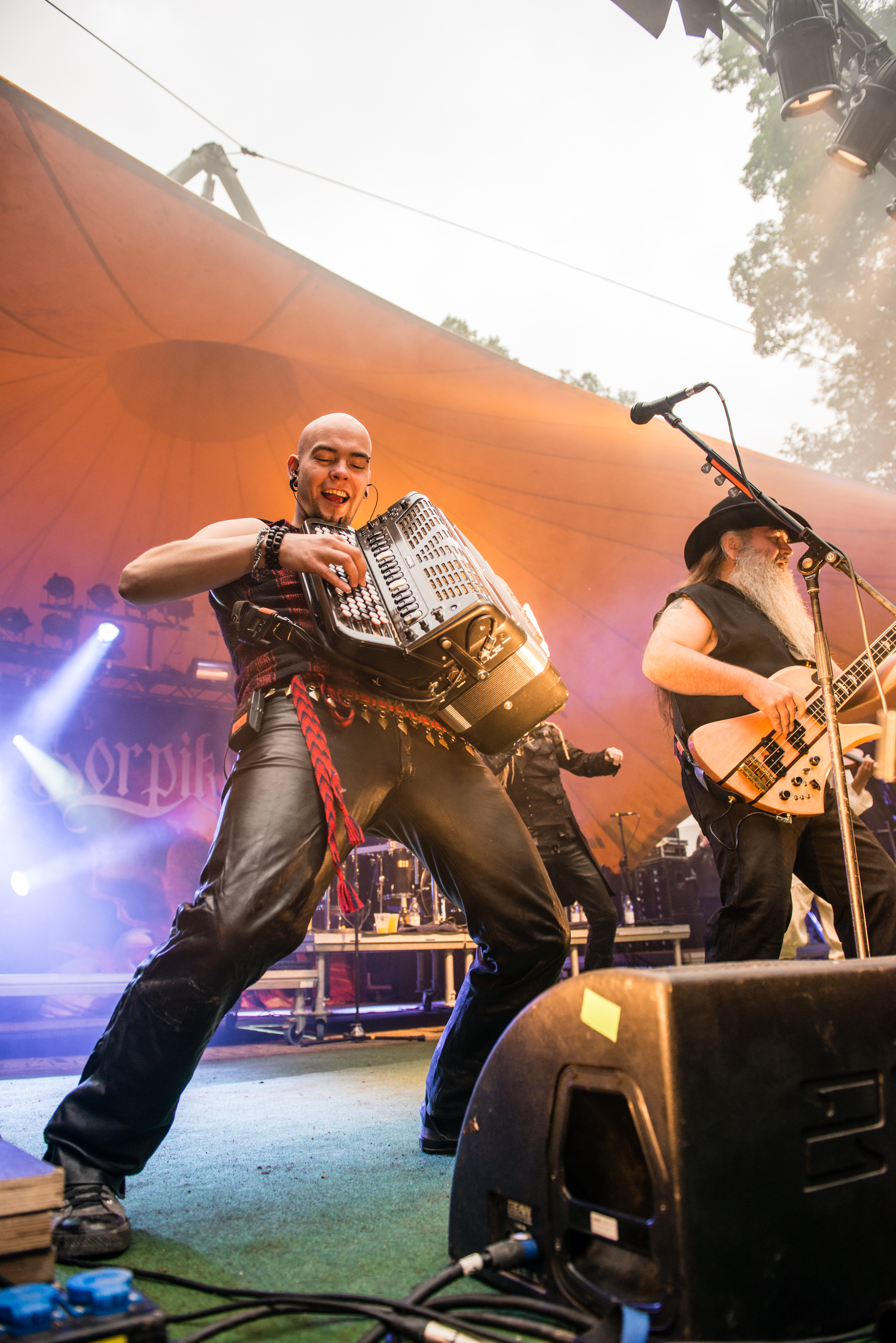 'Feuertal 2014 - Wuppertal': 'Korpiklaani'